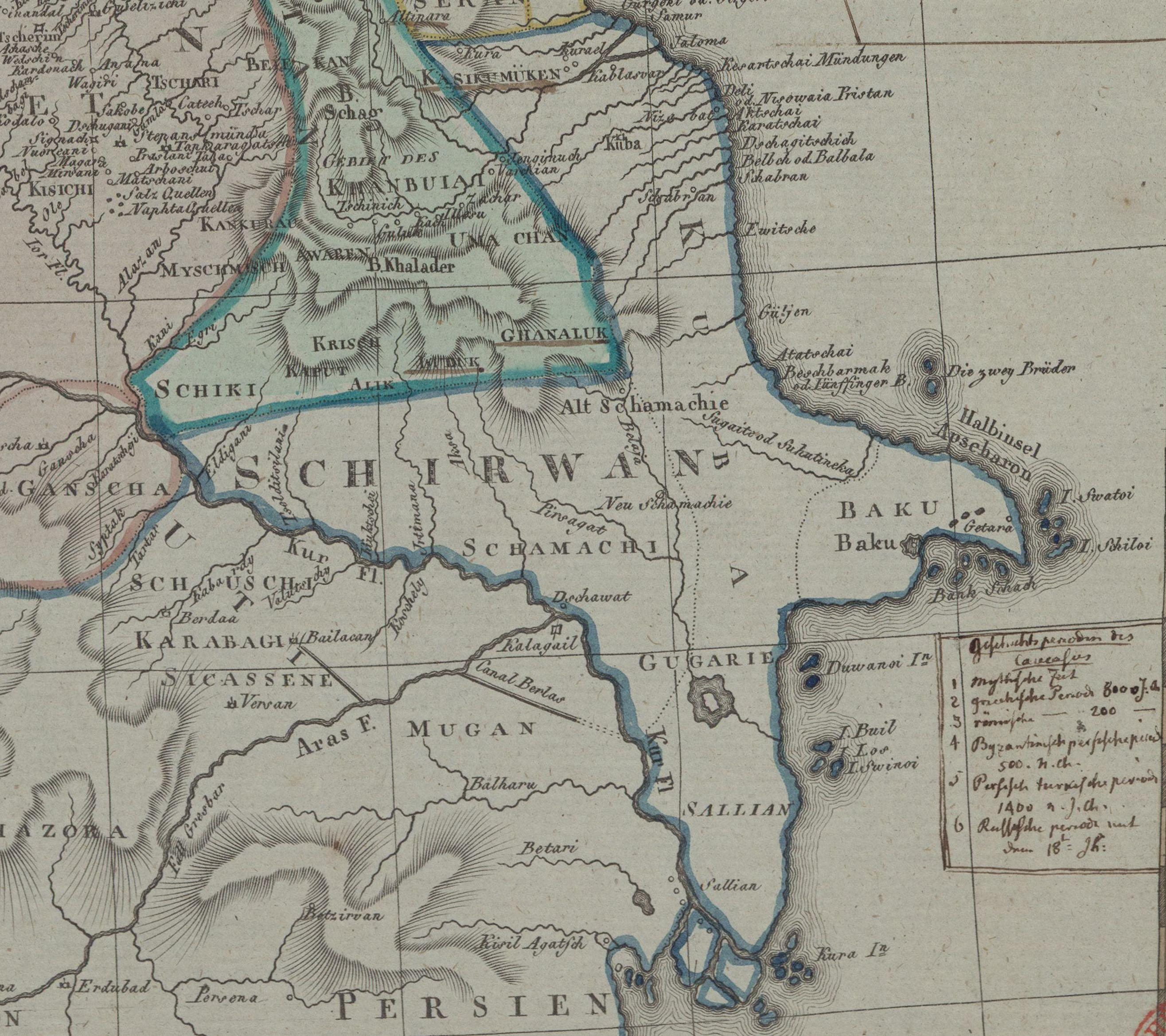 Charte von Laender am Caucasus nach den besten vorhand Charten, Reisen und Astronomischen Ortsbestimmungen / gegeichnet von I.C.M. Reinecke